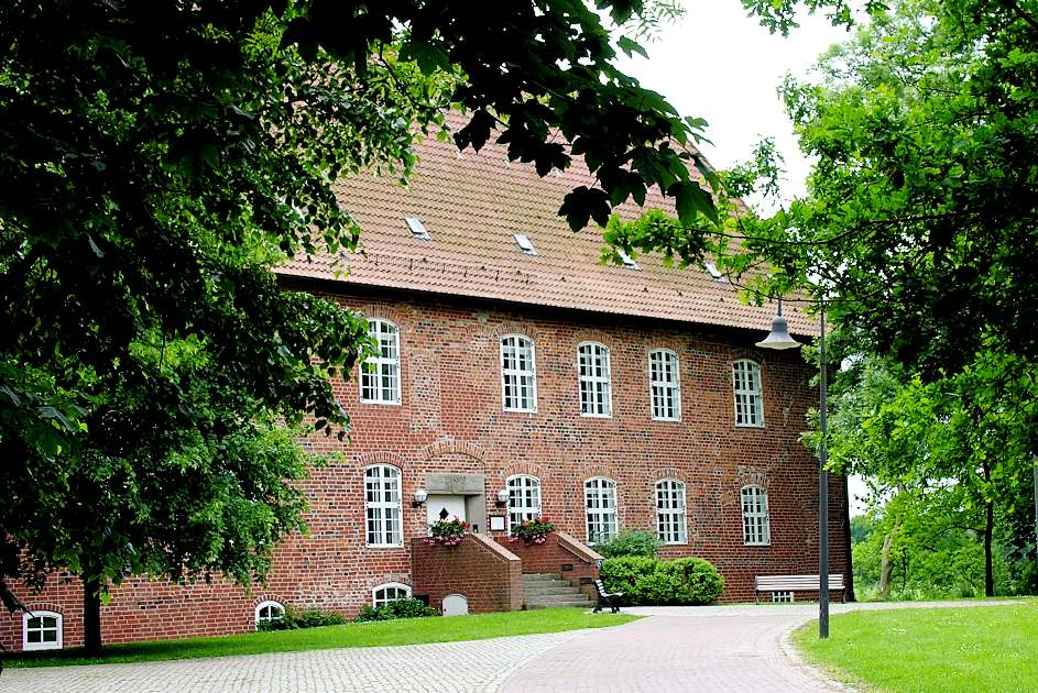 Burg zu Hagen im Bremischen (Landkreis Cuxhaven)